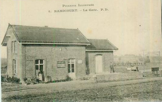 La gare de Ramicourt vers 1910.